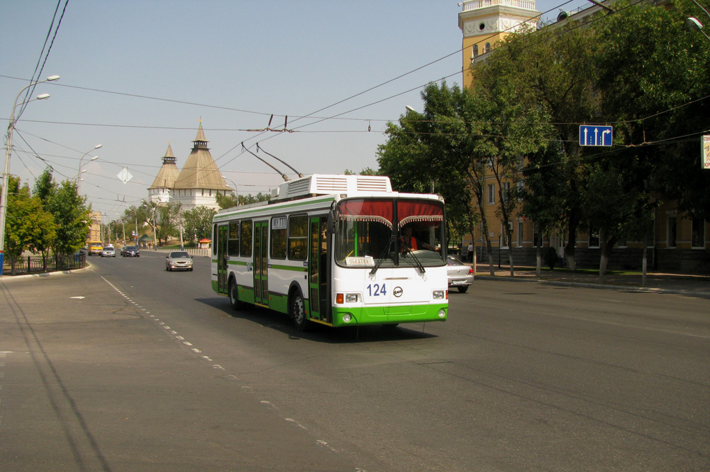 Троллейбус 124 (модели ЛиАЗ-5280) на Адмиралтейской улице в Астрахани